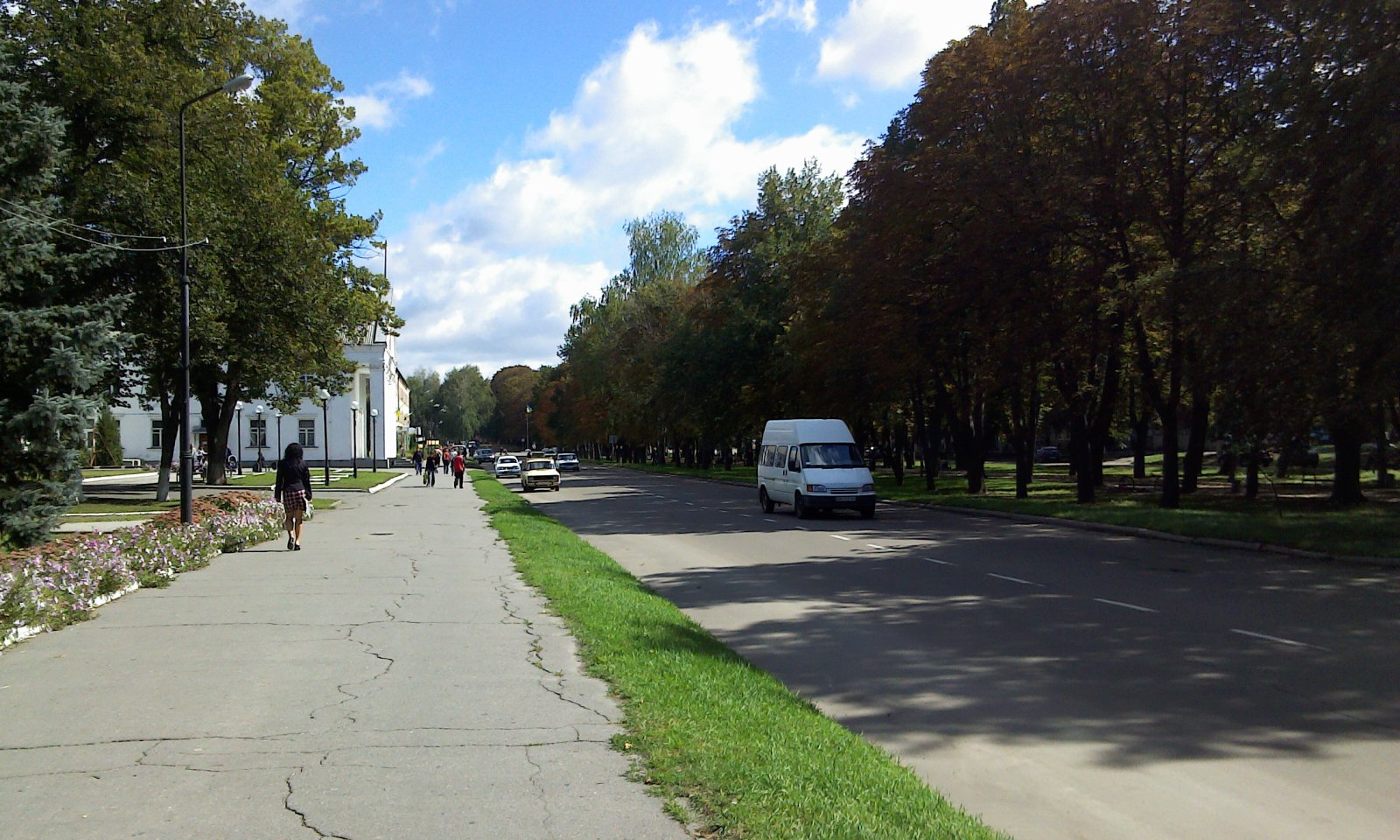 Бульвар Тараса Шевченка в місті Ромни